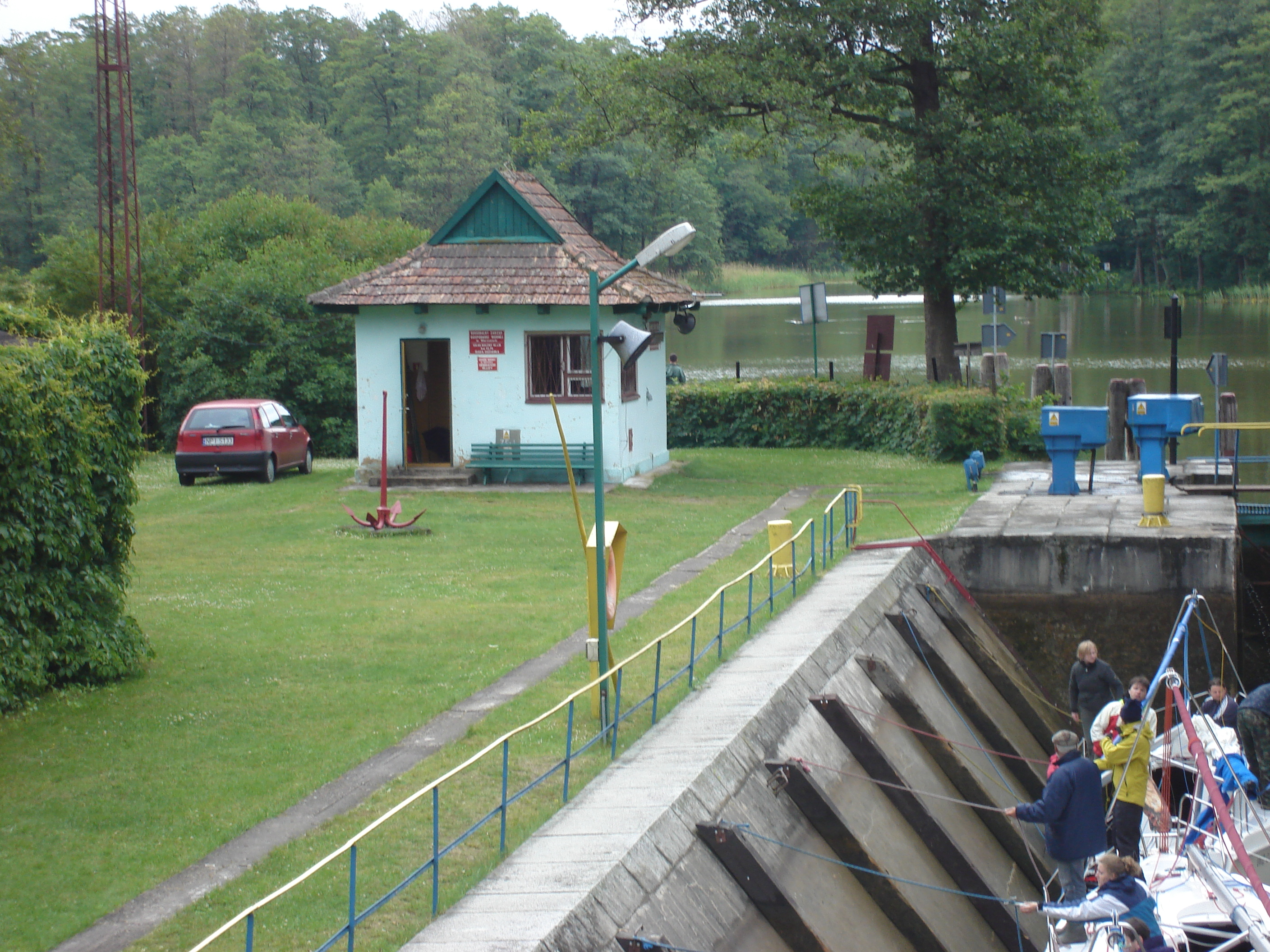 Śluza Guzianka. Zabezpieczanie jachtów.